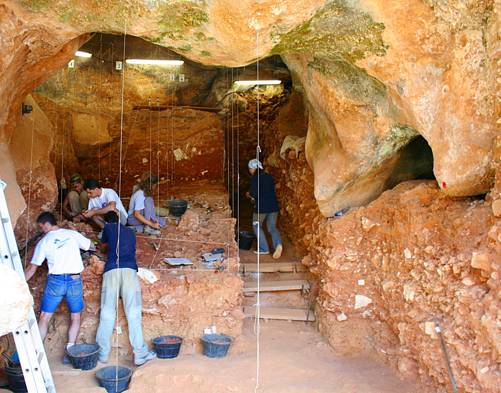 Trinchera Zarpazos en la campaña de 2006 (New version of Image:Zarpazos.jpg.)